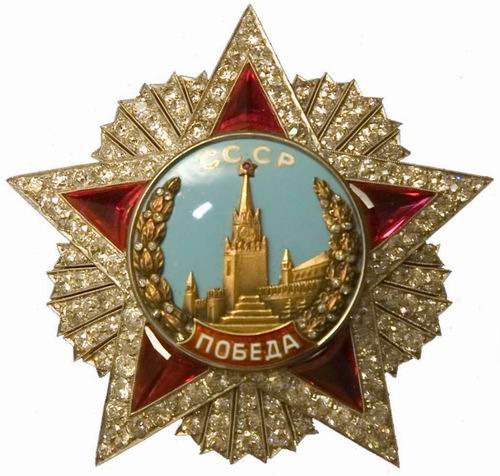 Один из орденов Победа Маршала Василевского, которые хранятся в музее Вооруженных сил РФ